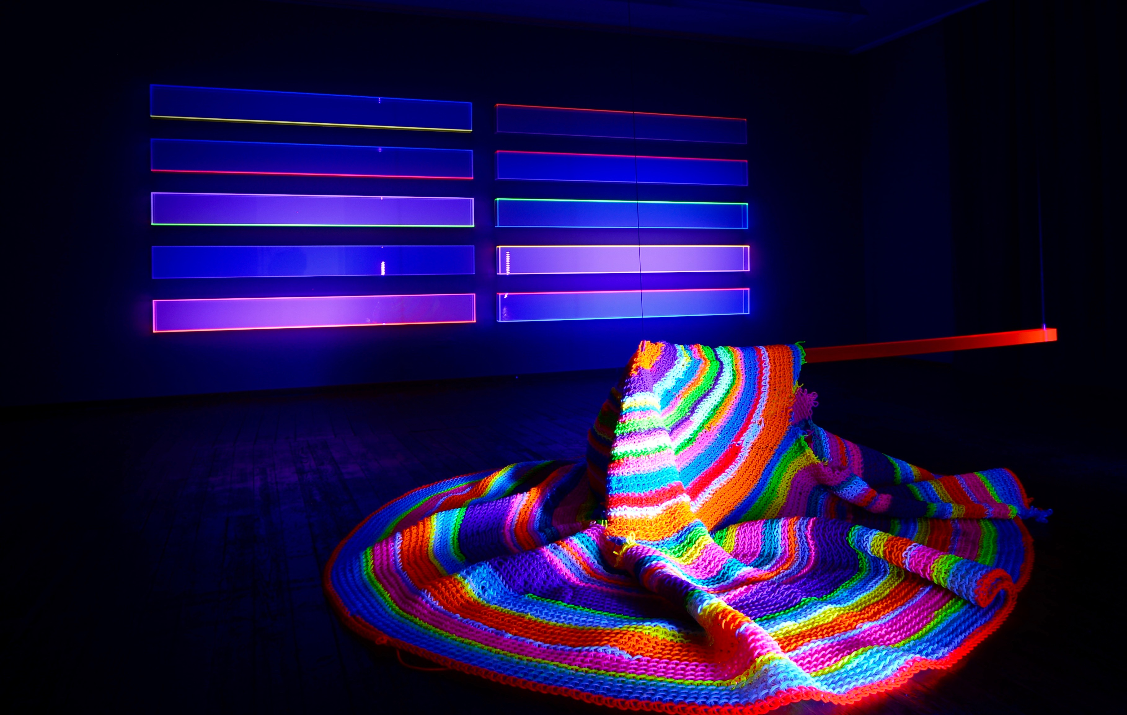 Regine Schumann: Installation im Neuen Kunstverein Aschaffenburg 2017